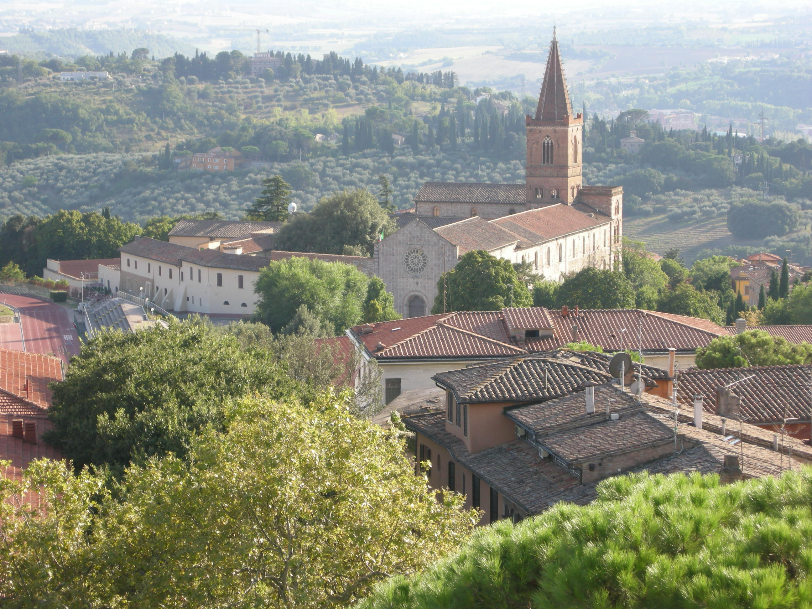 Perugia, view 05 san pietro